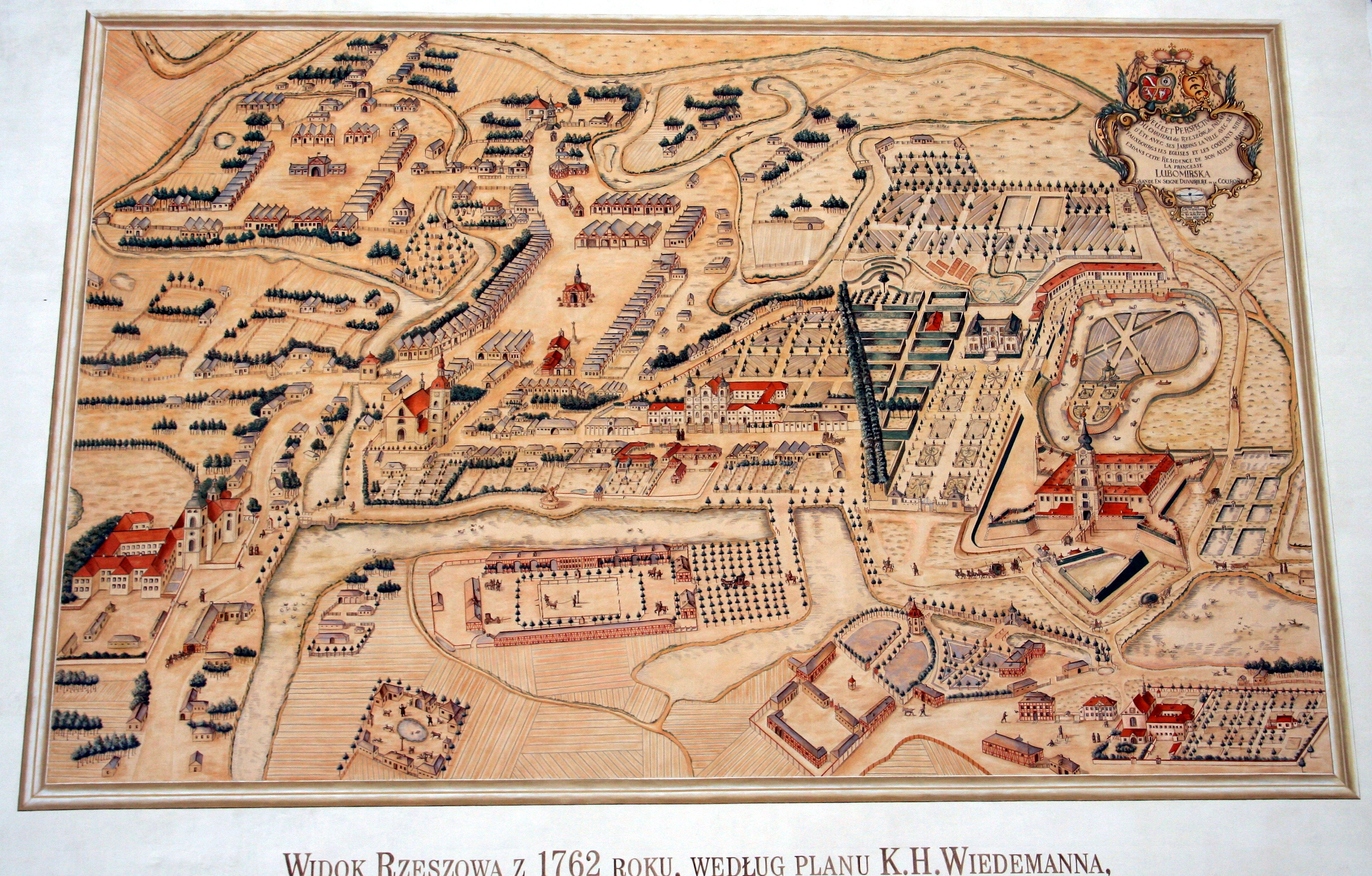 Mapa Rzeszowa z 1762 roku wg projektu Wiedemanna na ścianie jednej z śródmiejskich kamienic